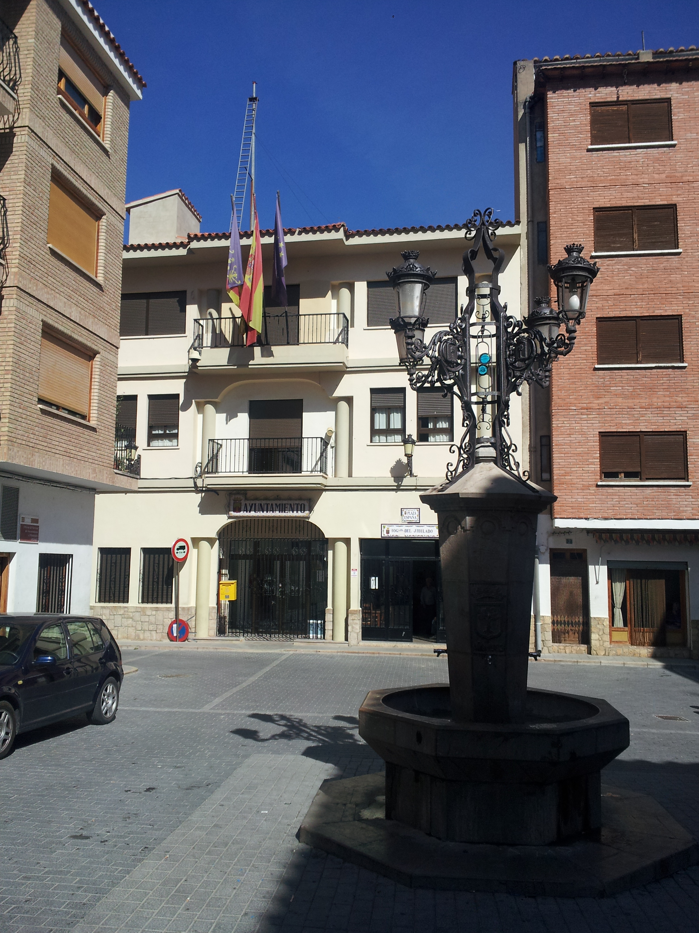 Ajuntament de Montanejos